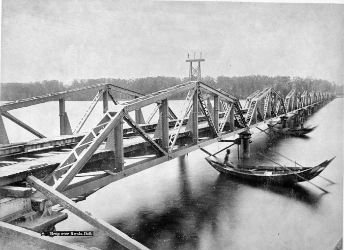 Foto. IJzeren spoorbrug met 34 overspanningen over de Soengai Deli in Oost-Sumatra, aangelegd door de Deli Spoorweg Maatschappij op het traject Medan - Belawan.